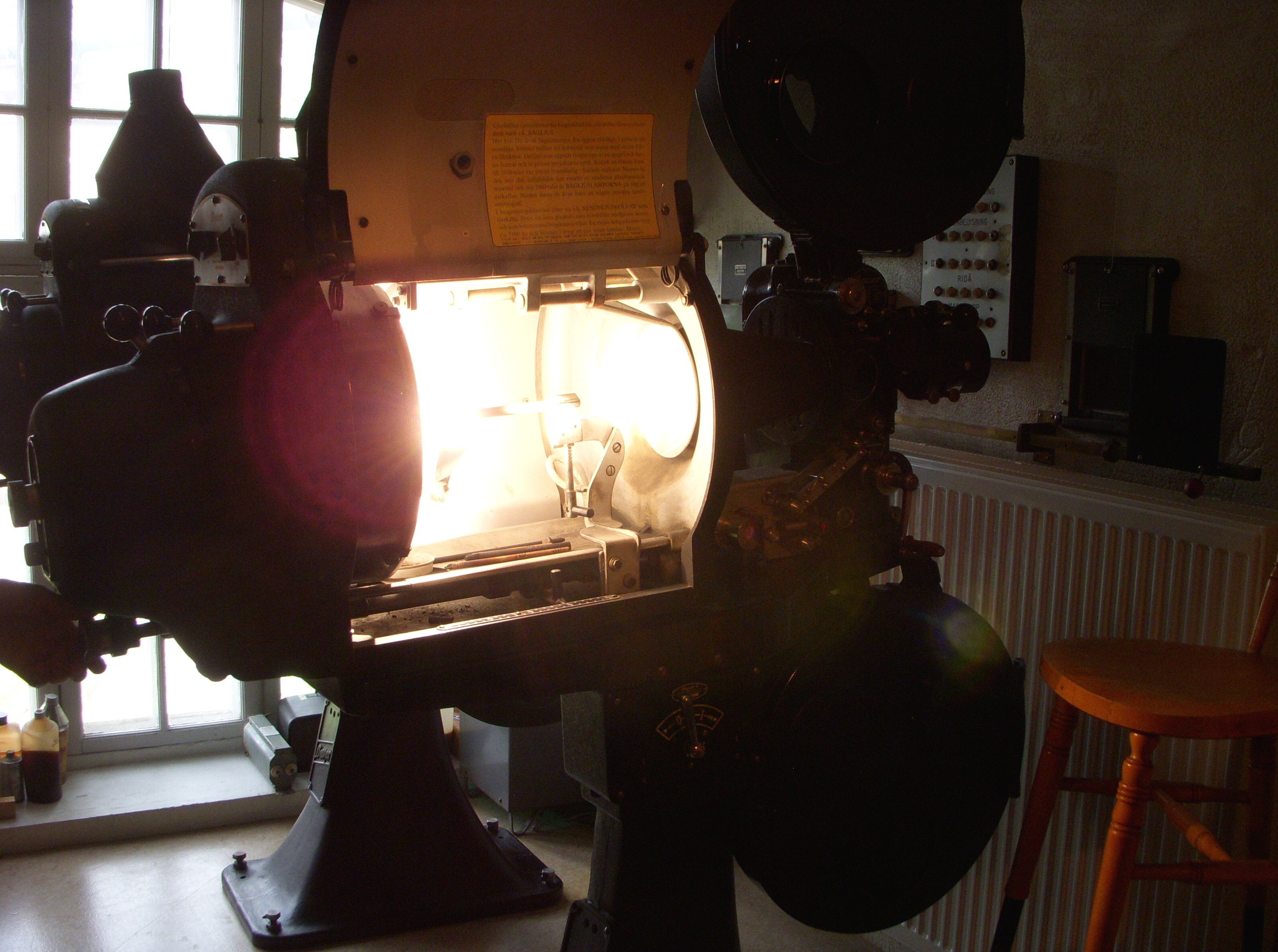 Biografmuseet i Säter, filmprojektor med ljusbågs-lampa (igång)